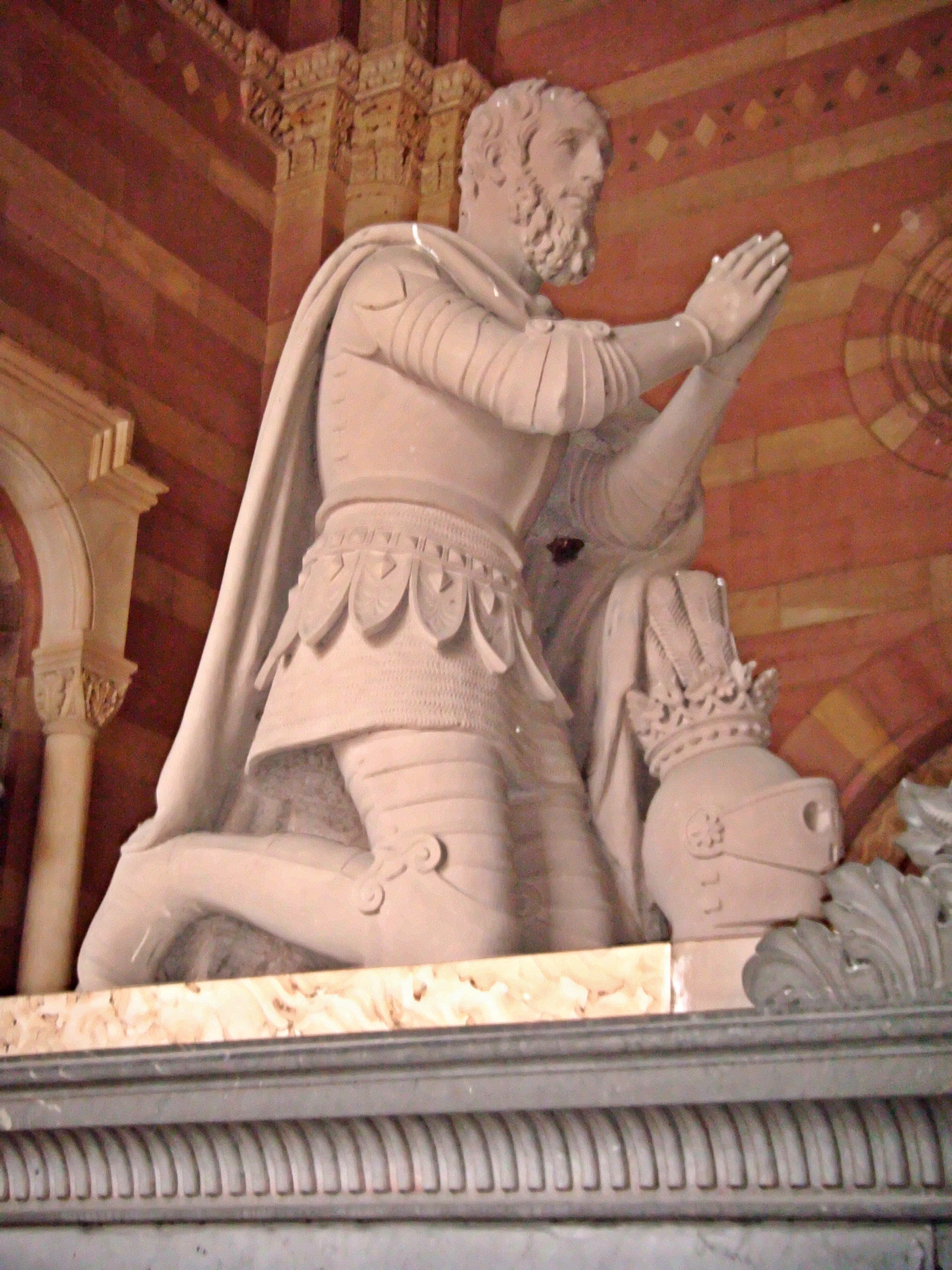 Landolin Ohnmacht (1760-1834); Großstatue des Königs Adolf von Nassau, auf seinem Grabmal im Speyerer Dom, 1824; nach einem Entwurf von Leo von Klenze